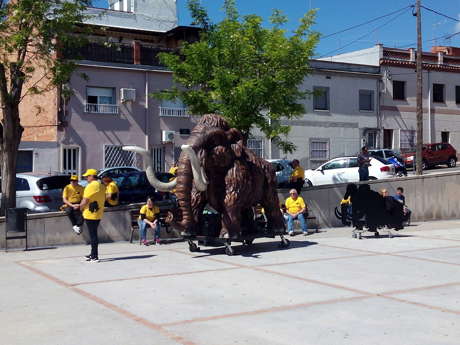 La Colla amb en Vilamut